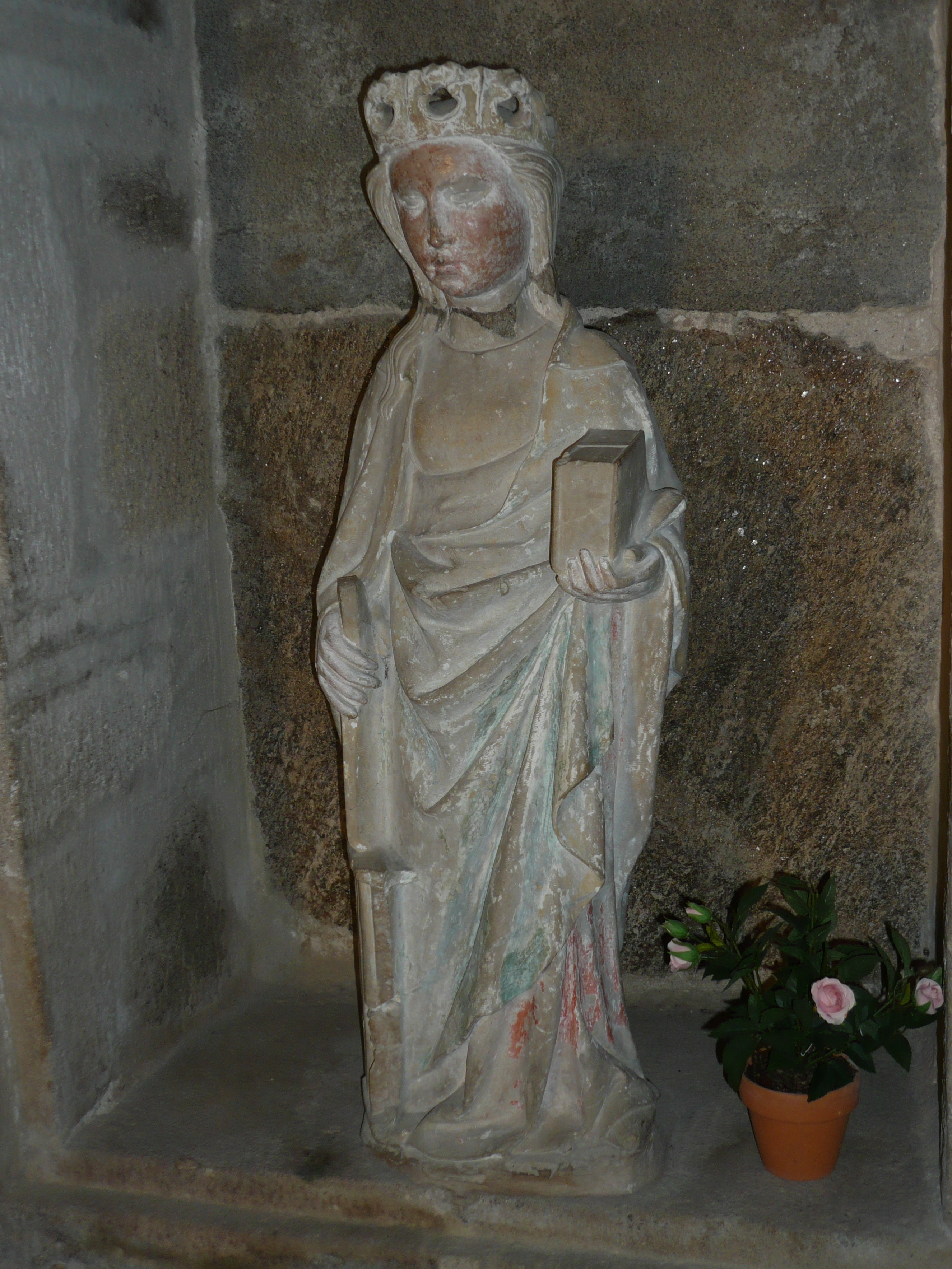 Sainte-Foy, statue en pierre polychrome, de la Sainte Vierge dans l'église de Notre Dame d'Aures (Aveyron), datée du début du XV ème siècle.